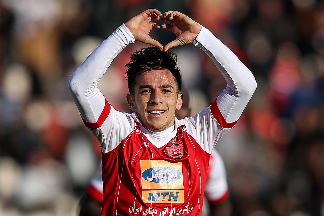 پرسپولیس - صنعت نفت - ورزشگاه آزادی تهران